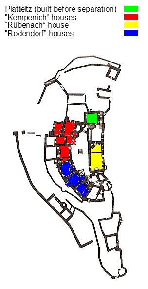 Grundriss der Burg Elz